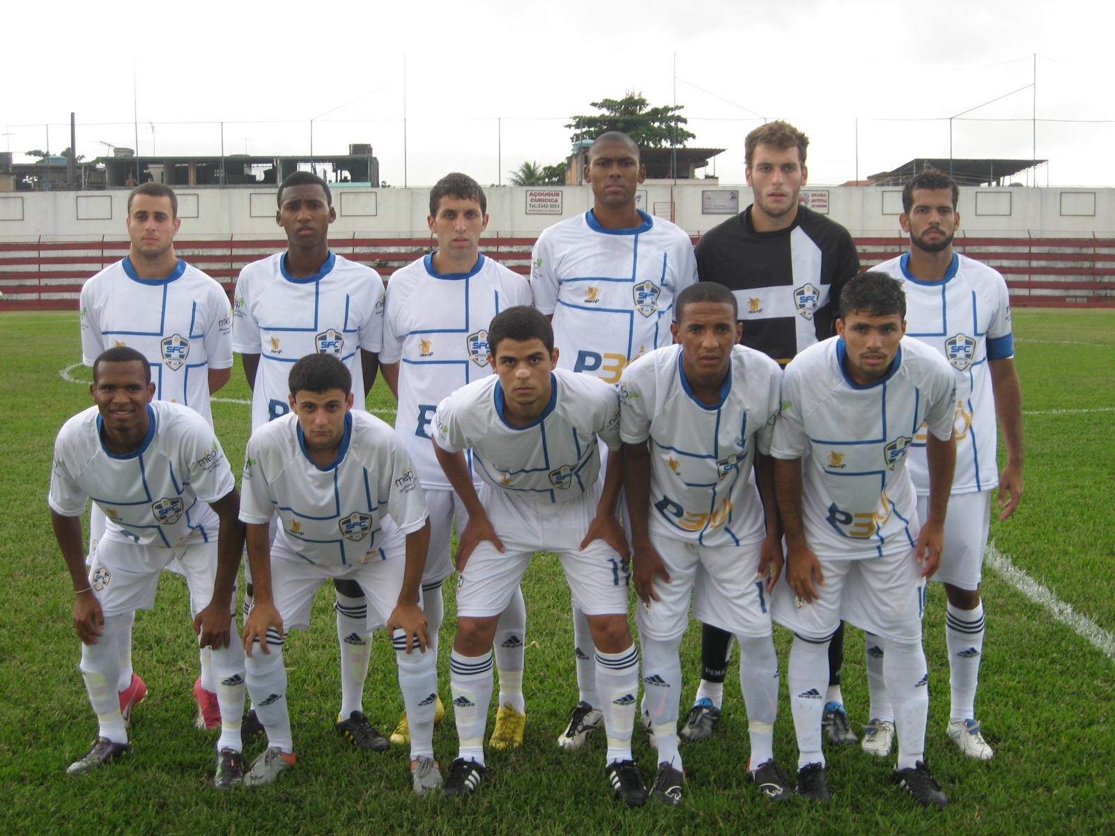 Equipe profissional do Serrano em 2011.